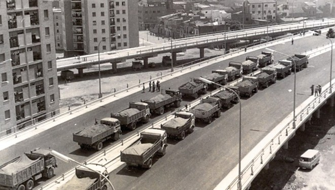 Construcció de l’Autopista C-31, en el seu pas per Badalona, sobre l’any 1968-70